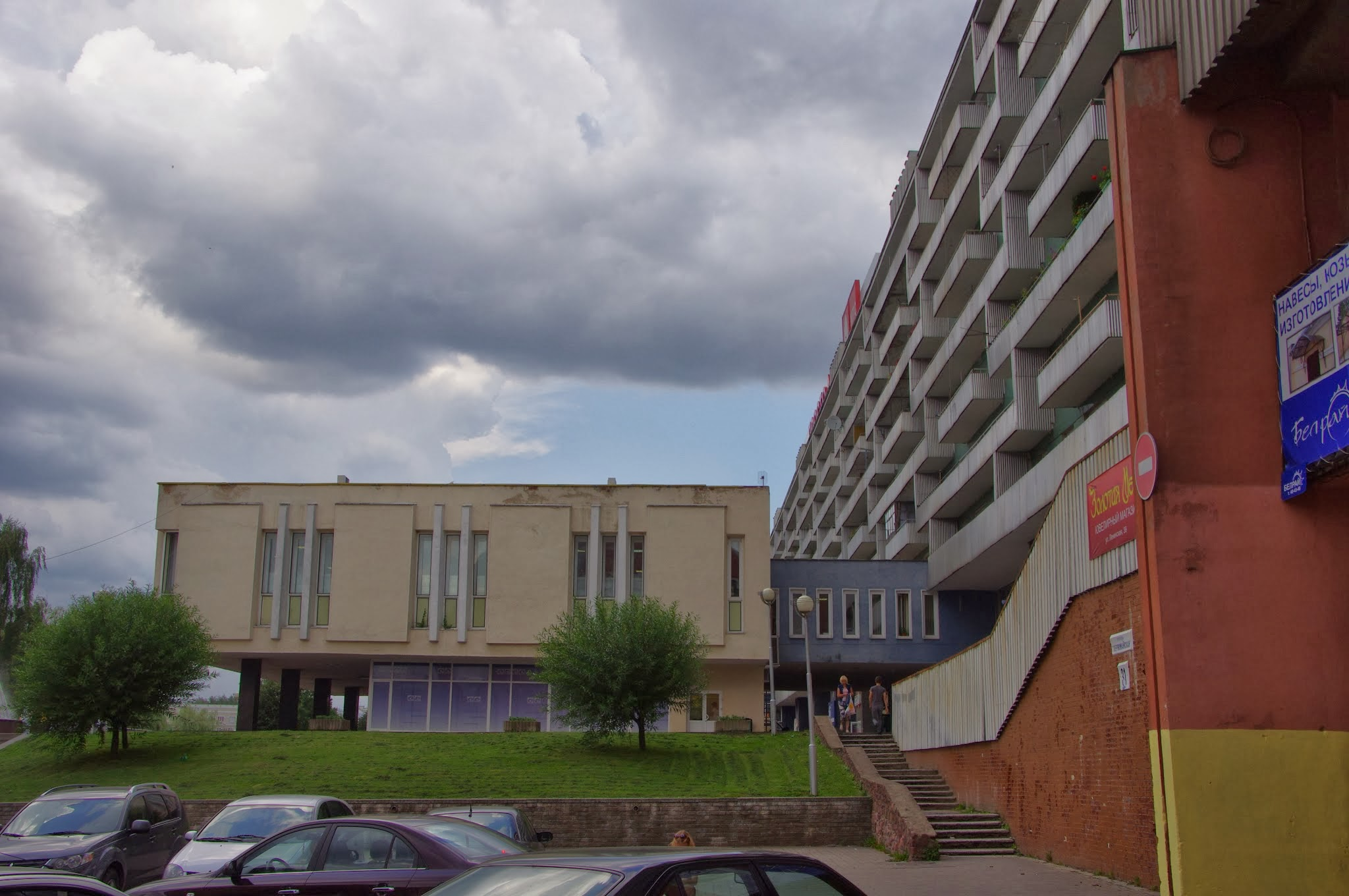 Lieninski District, Mogilev, Belarus